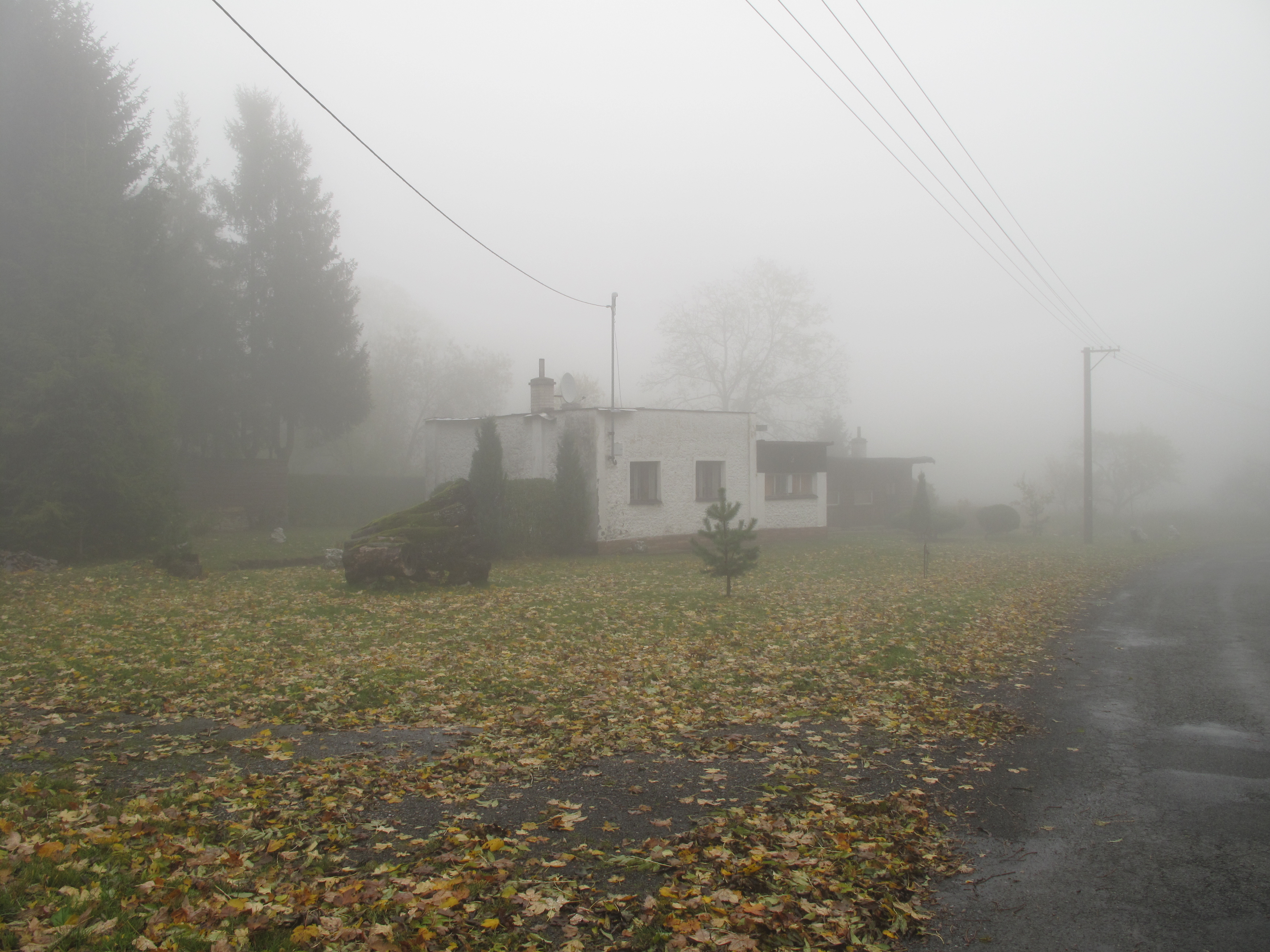 Česká Ves (Město Albrechtice). Okres Bruntál, Česká republika.